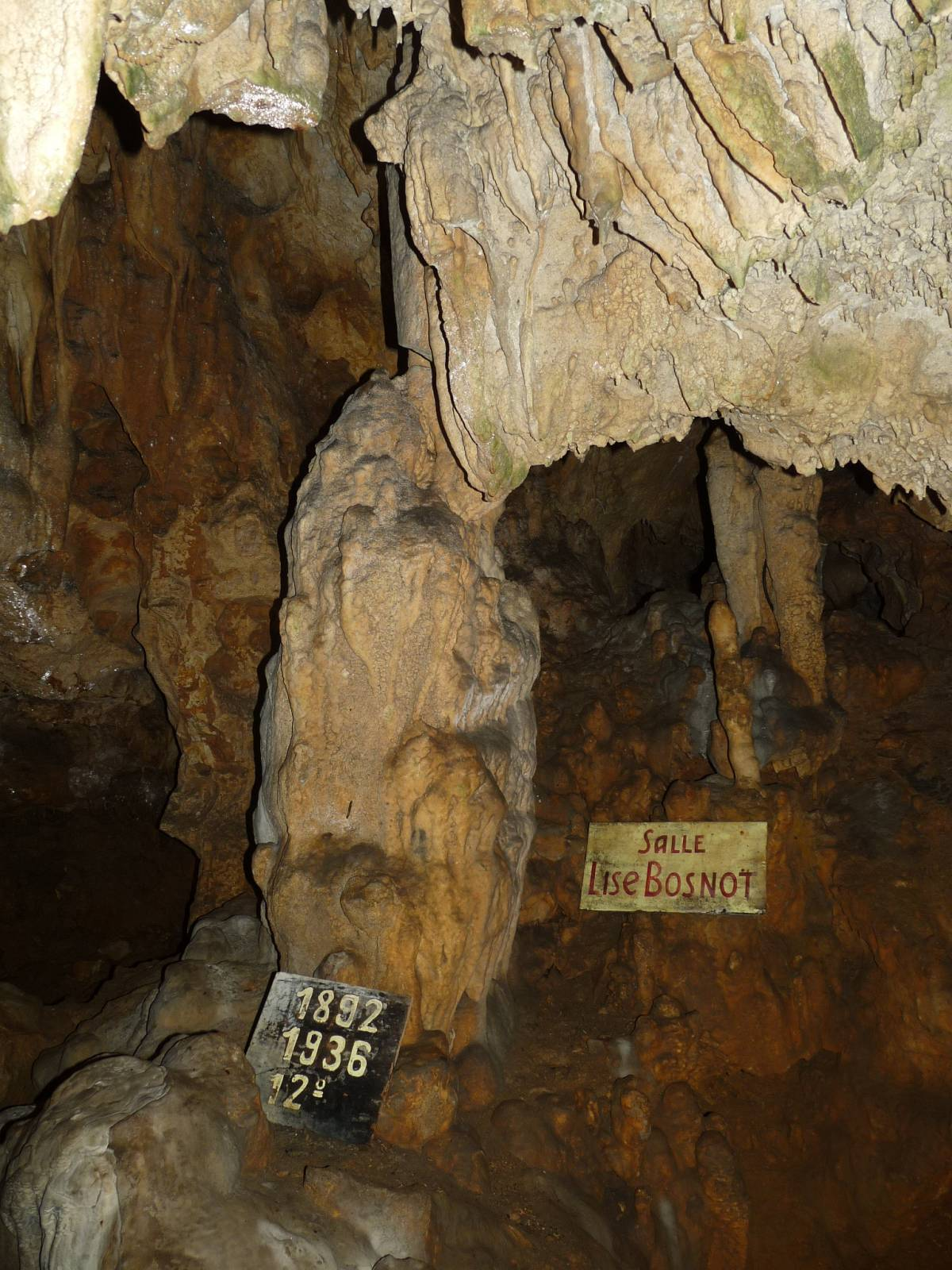 Grottes du Quéroy, Chazelles (16), France